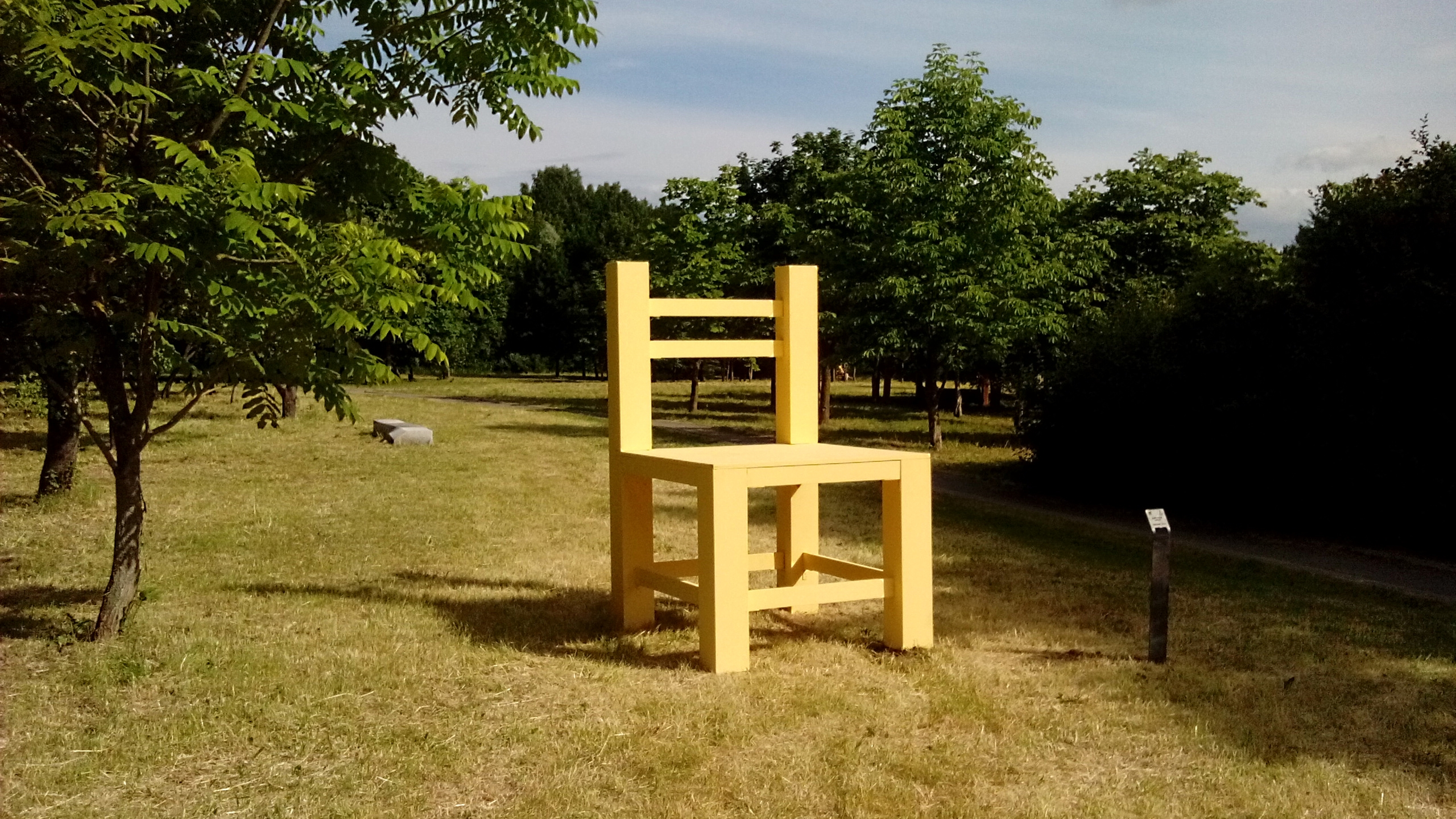 Сырный стул. Автор - Денис Барсуков.